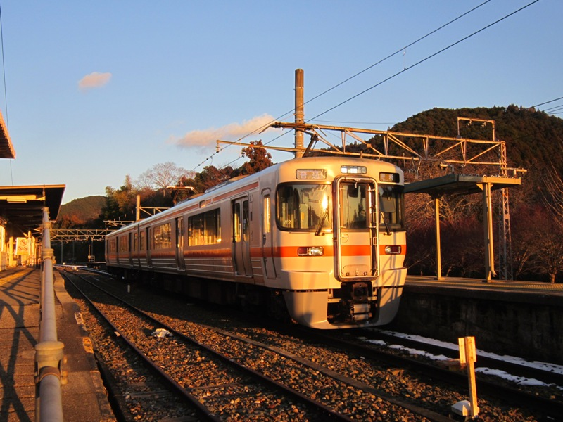 使用はご自由にどうぞ